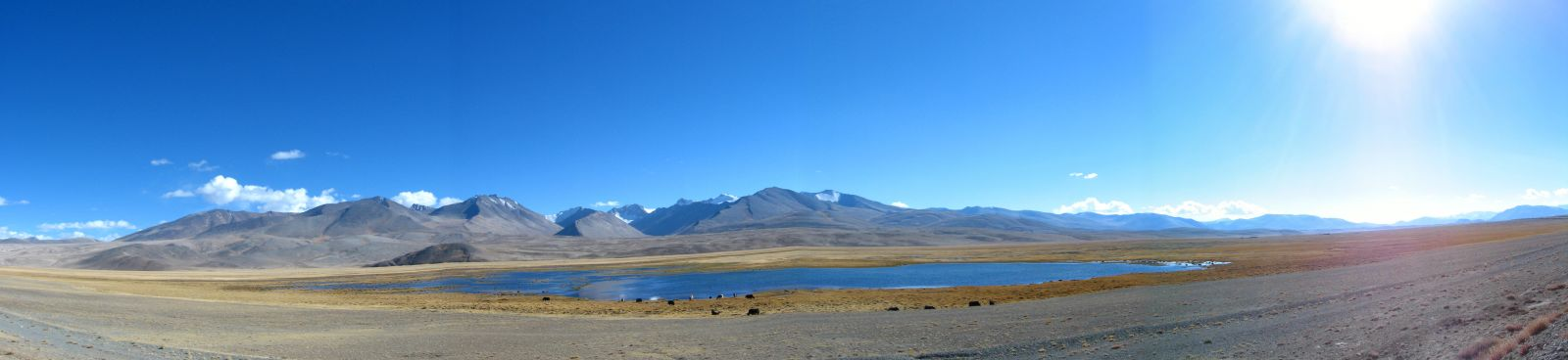 Near Alichur, Tajikistan